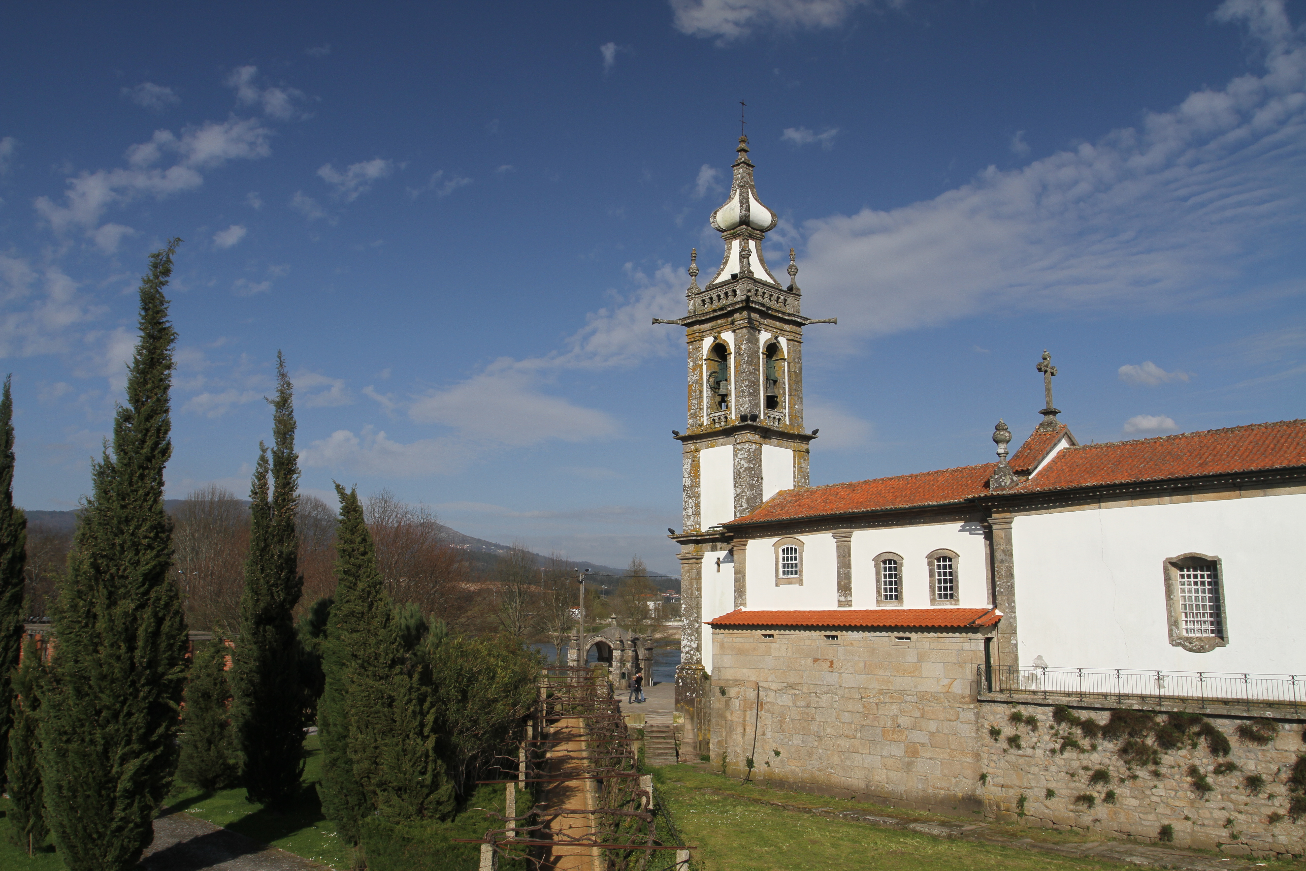 Igreja de Santo António - Ponte de Lima This file was uploaded for Wiki Loves Monuments in Portugal with the unique identifier 74694. This building is classified as Imóvel de Interesse Público.